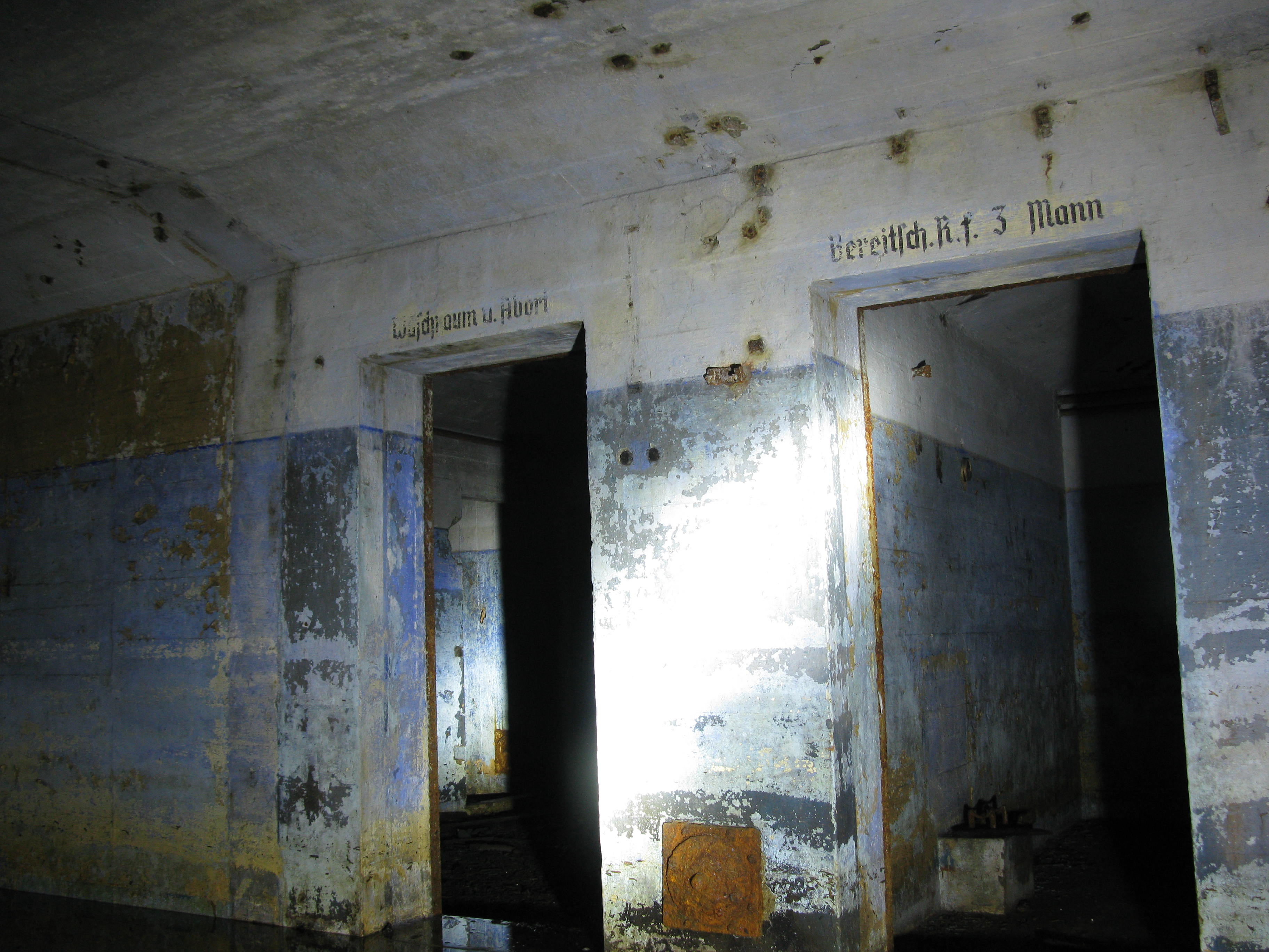 Надпись готическим шрифтом в немецкой береговой артиллерийской батарее 1941-1944 гг. Калининградская обл, пос. Капорное